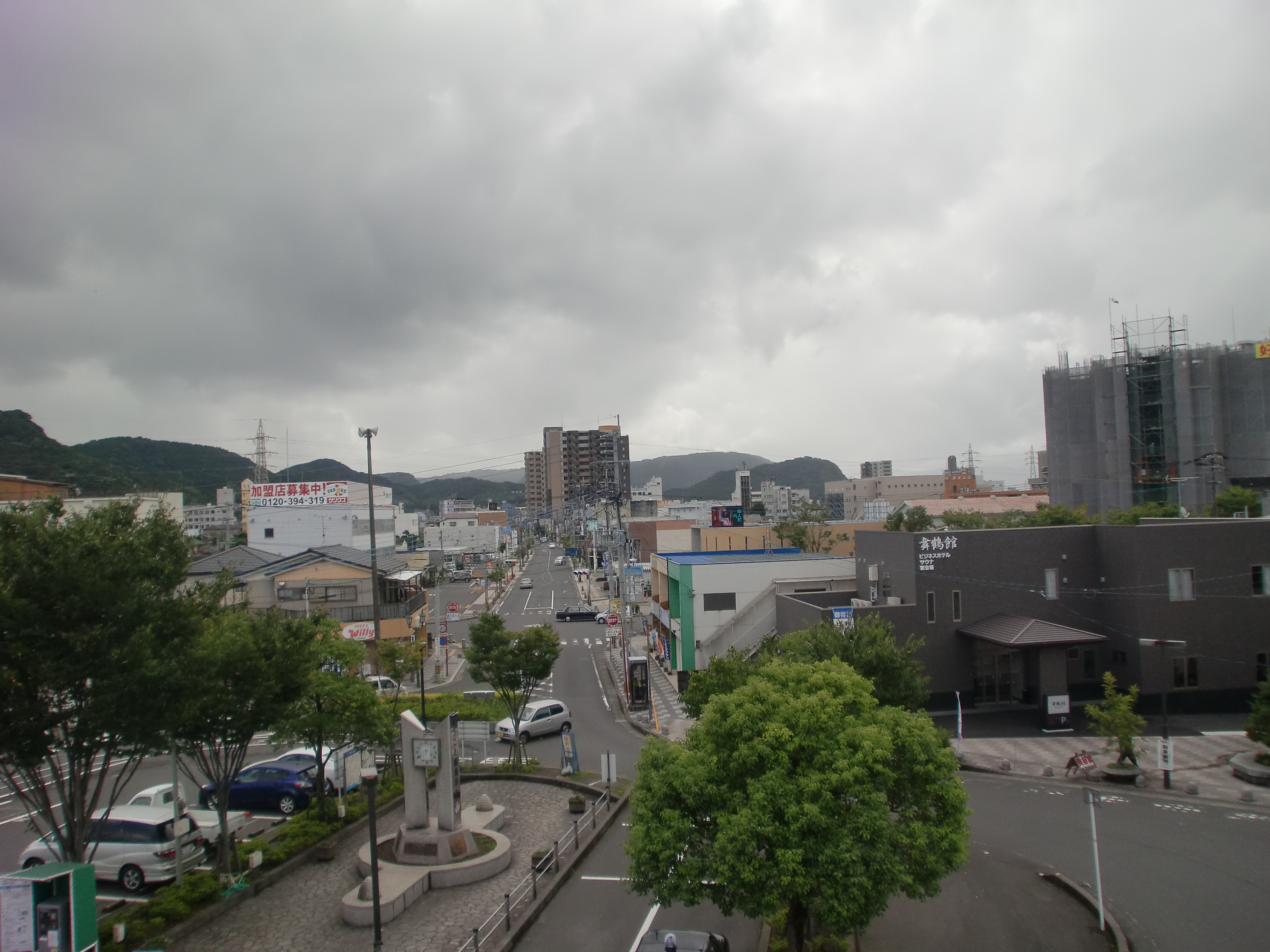 国分駅前の国分市街地の風景。